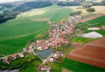 Letecký snímek obce Znětínek